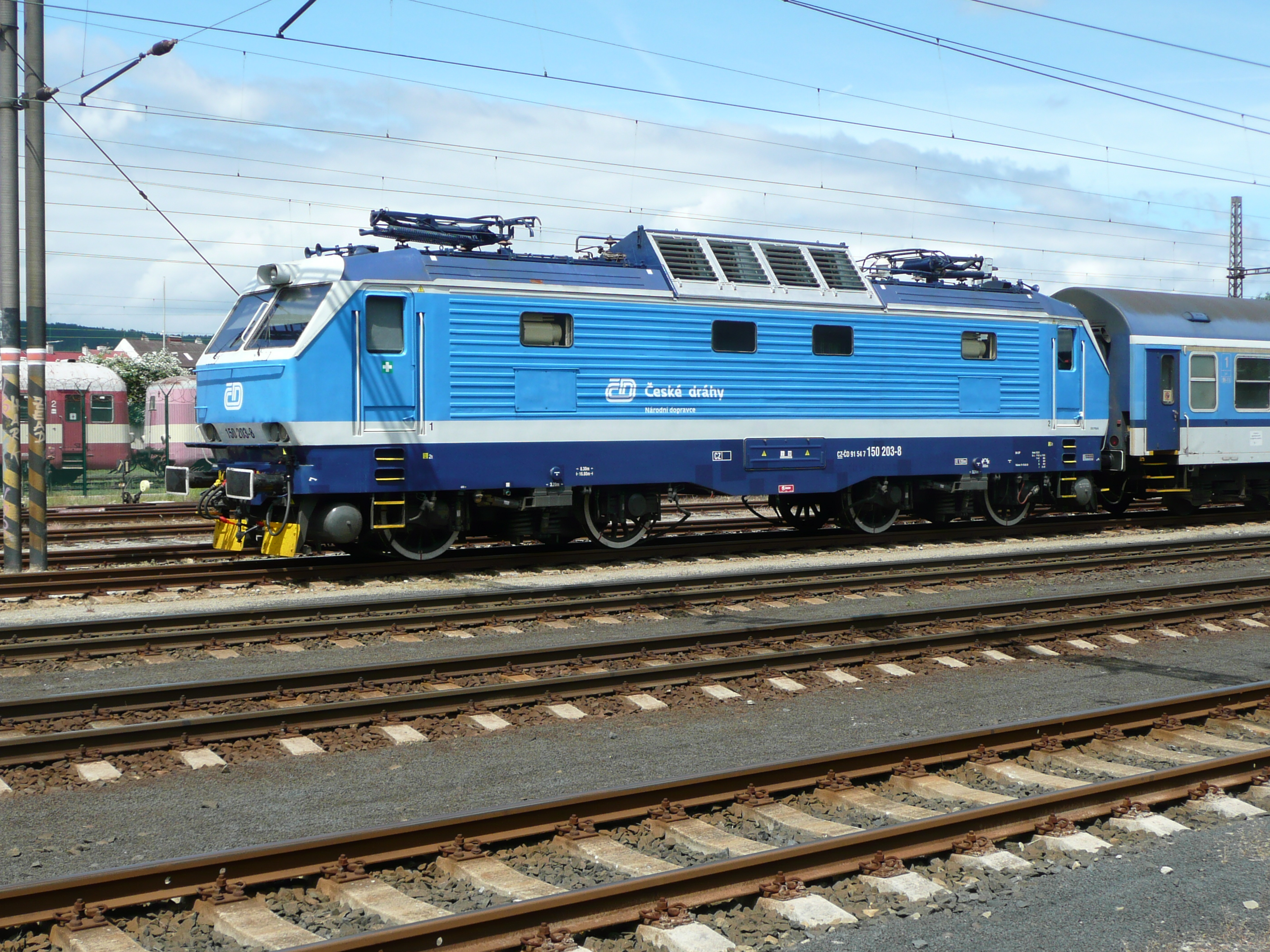 150.203 im Bahnhof Chomutov